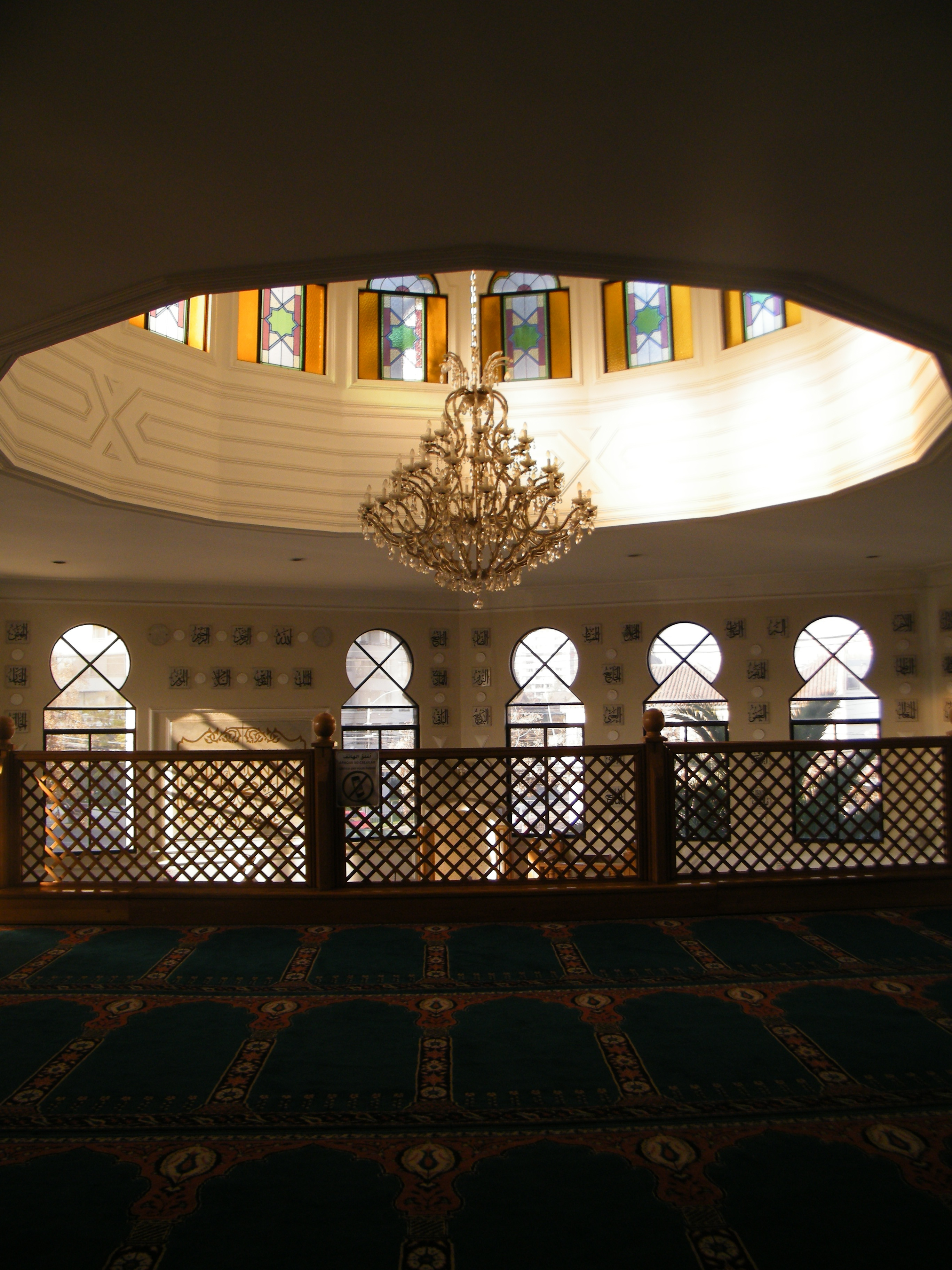 fotoiglesia3